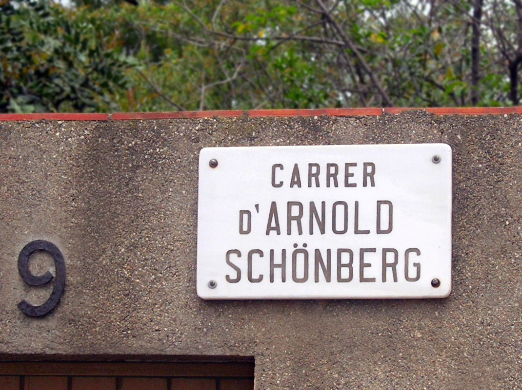 Arnold Schönberg, compositor austríaco inventor del dodecafonismo, es el autor de obras maestras que influyeron en la transformación del lenguaje musical del siglo XX. En momentos de crisis artística se concentró en el piano y escribió con talento partituras cruciales, de extrema dificultad técnica, que dejaron constancia de una insólita exploración de nuevos territorios musicales. Compuso una de ellas —la Pieza para piano (1929), op. 33a— durante una estancia en Barcelona: residió en una casa modernista, en el distrito de Vallcarca, junto al Parc Güell. Por eso, en 1989 se le dedicó allí una calle.